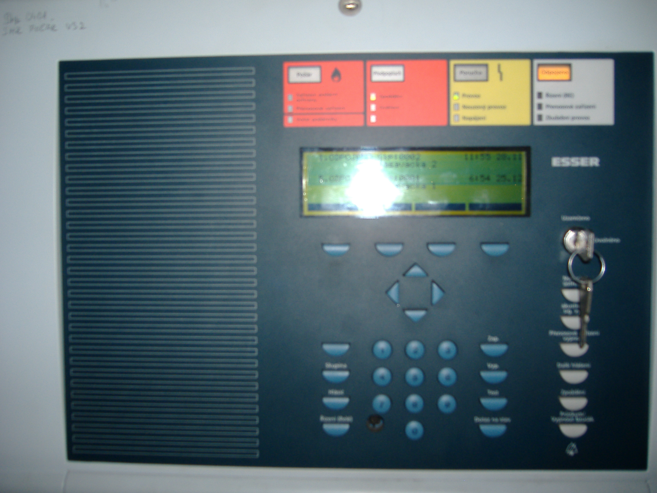 EPS ESSER